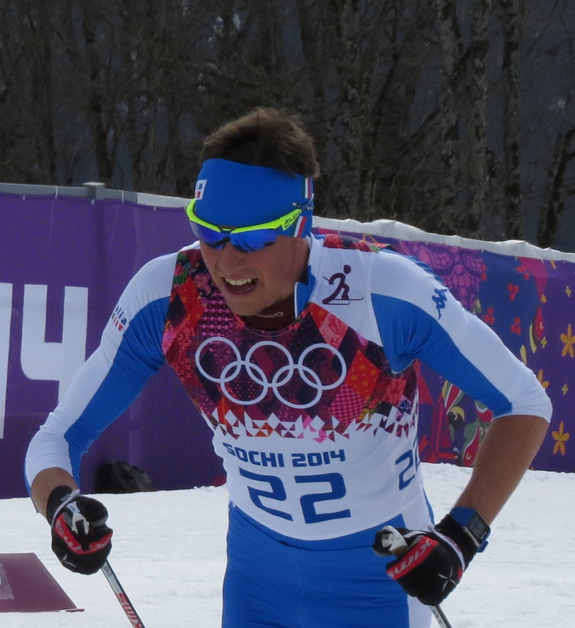 Лыжные гонки на зимних Олимпийских играх 2014 — 15 км классическим стилем (мужчины)